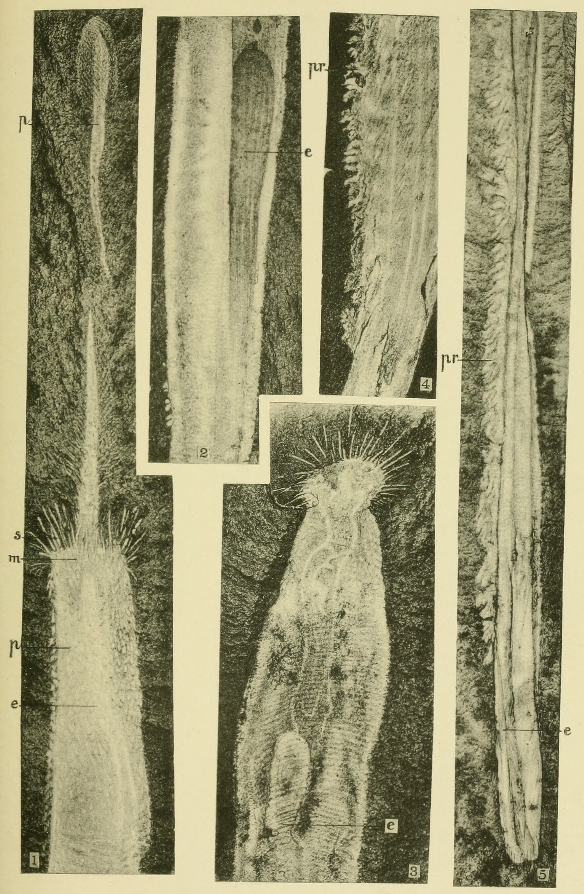 Plate 18: Middle Cambrian Annulata (Miskoia) 1. Miskoia preciosa Walcott = 2. Miskoia preciosa Walcott = 3. Miskoia preciosa Walcott = 4. Miskoia preciosa Walcott = 5. Miskoia preciosa Walcott =